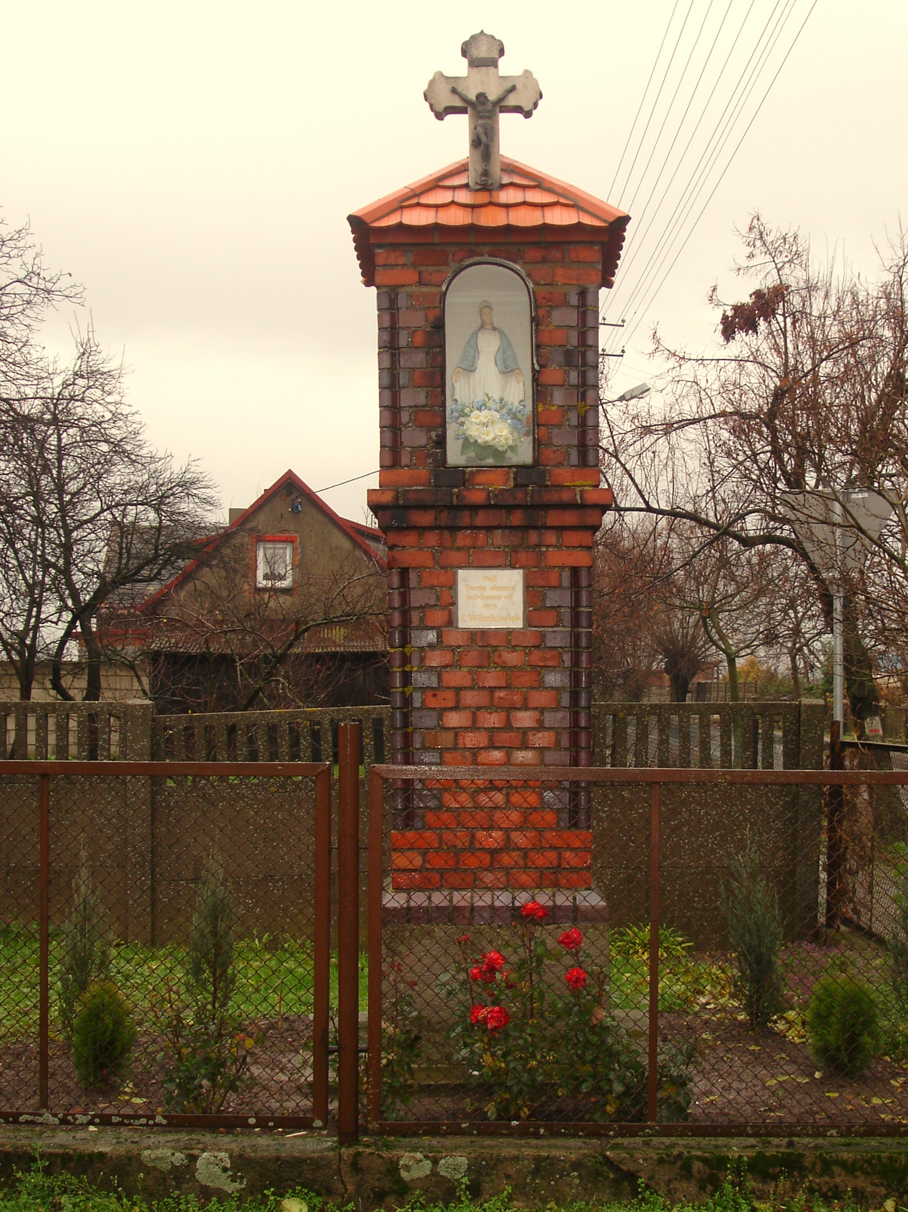 kapliczka z figurką Matki Boskiej w Pawłowicach z 1913 roku